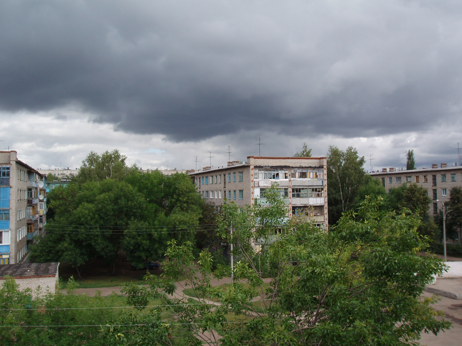 Стерлитамак - один из самых зеленых городов России